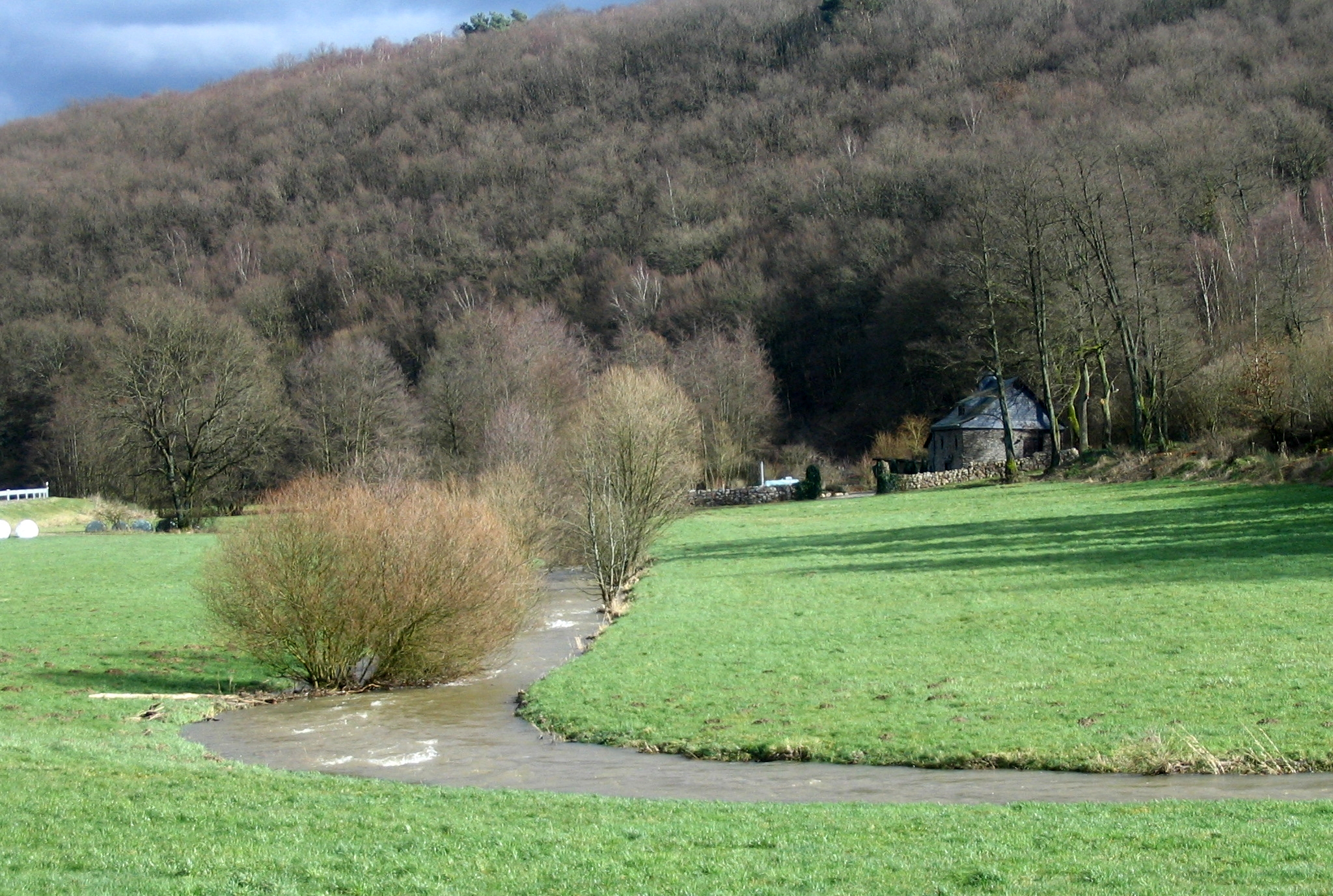 Idarbach bei Hausen im Hunsrück